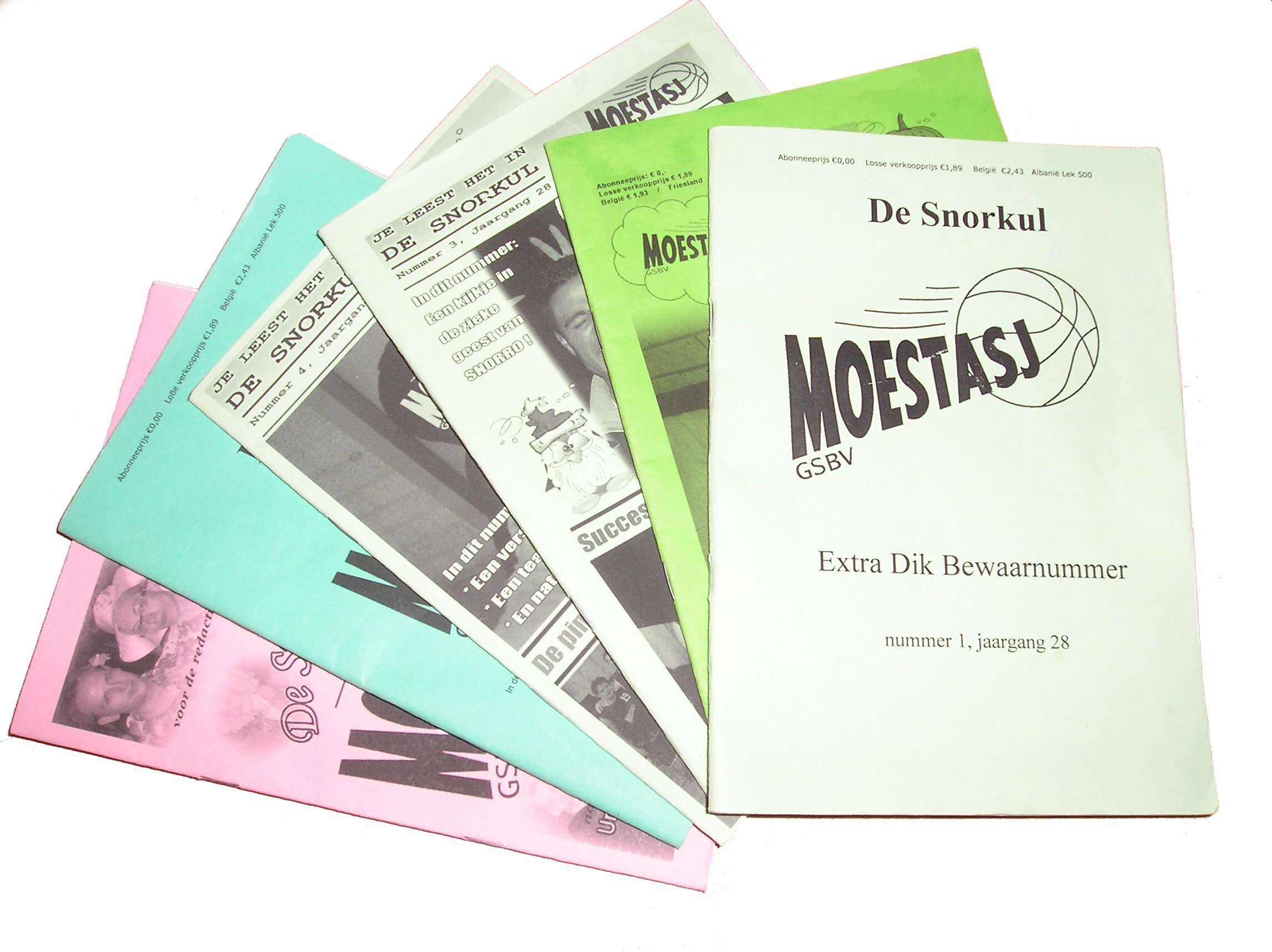 Het Clubblad van basketbalvereniging GSBV Moestasj De Snorkul.